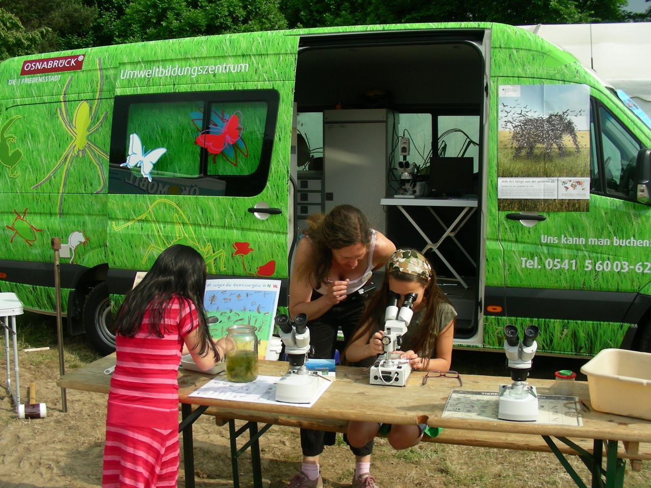 Das Bild zeigt Kinder die bei einem Einsatz des Umweltmobils "Grashüper" mit Hilfe einer pädagogischen Kraft Wassertiere erforschen.